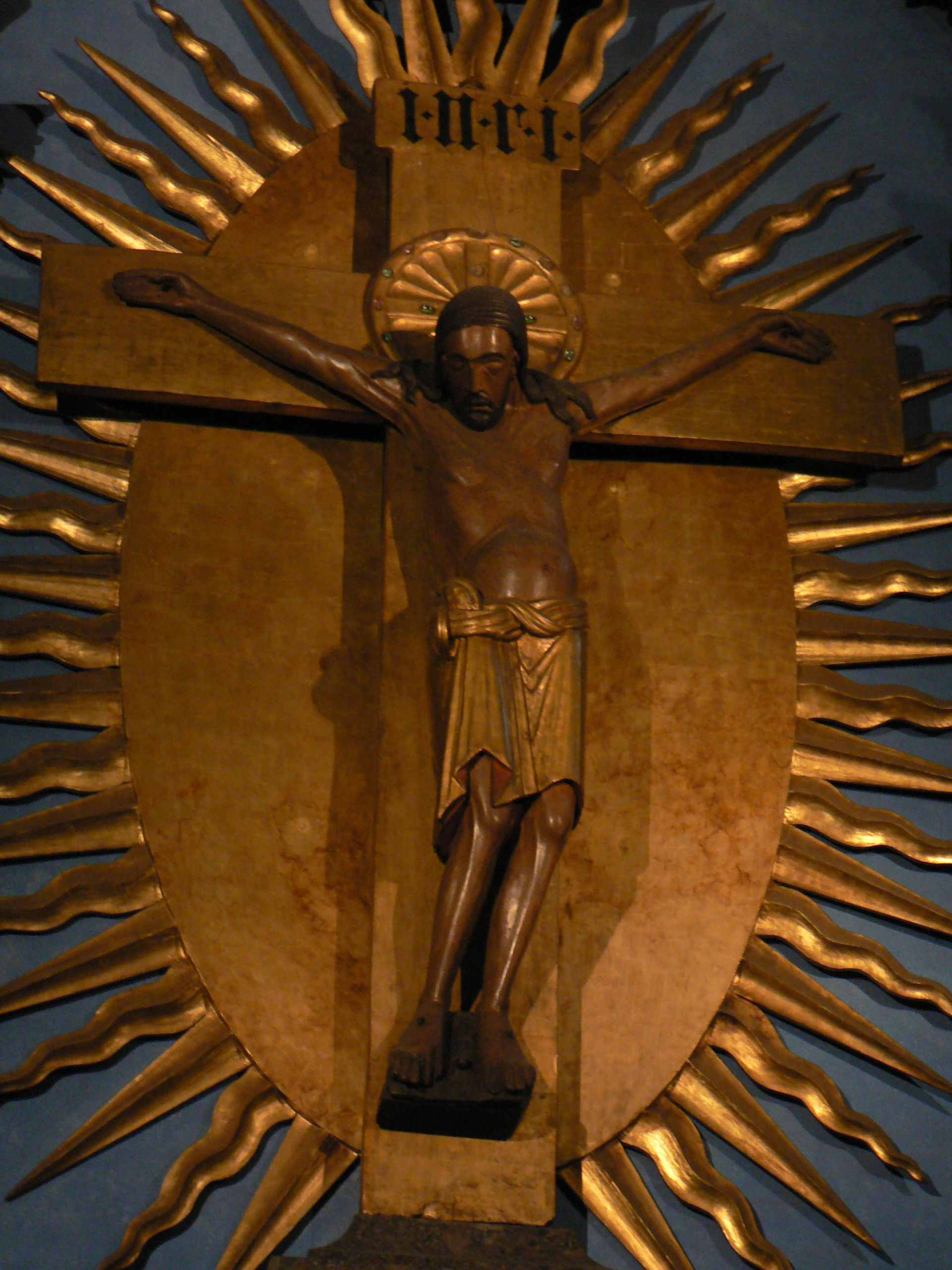 Romanisches Kreuz im Kölner Dom - eine der ältesten Großplastiken in Deutschland